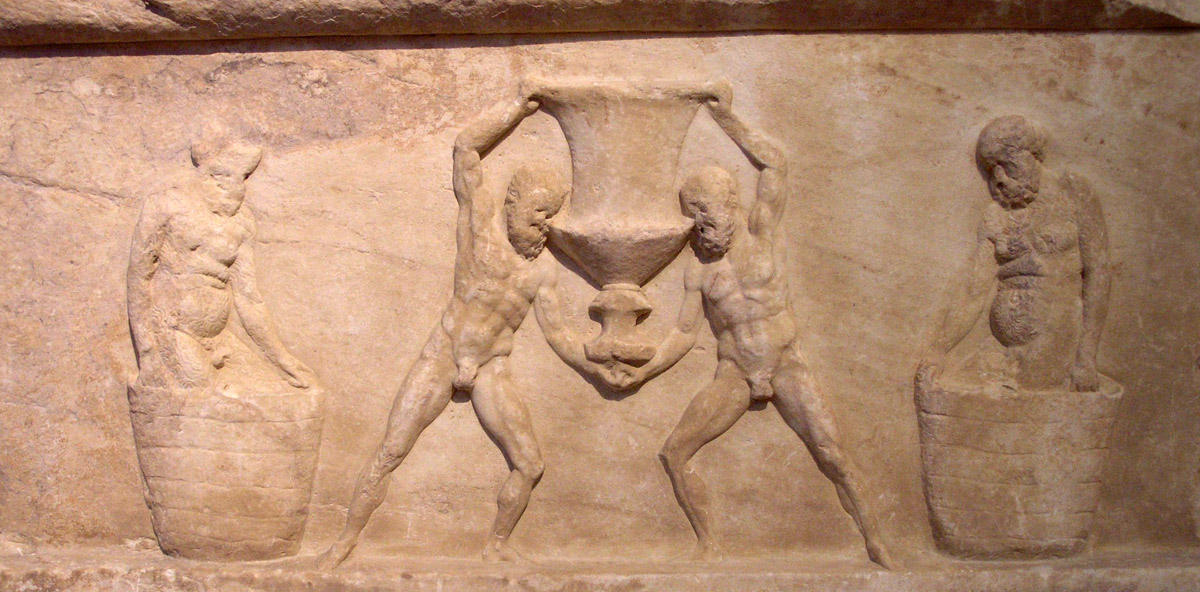 Bas-relief appartenant à un groupe de plaques, en marbre pentélique, trouvé à Athènes, rue Rigillis. Les trois plaques, avec leurs reliefs dionysiaques, devaient former le revêtement d'un autel. Ici la plaque 3498, des Silènes et des Satyres font du vin : deux d'entre eux pressent les grapes et au centre deux autres portent un cratère (calyx) rempli du jus des raisins. Fin du IIe s. a. C. ou selon une opinion récente 400-375 a. C.